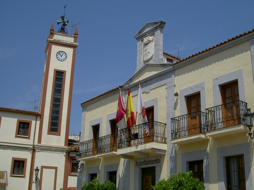 Navalcán localidad española situada en la comarca de Talavera en Castilla la Mancha